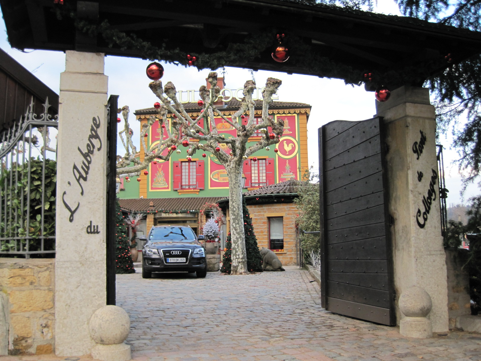 Restaurant Paul Bocuse à Collonges en Mont d'Or près de Lyon